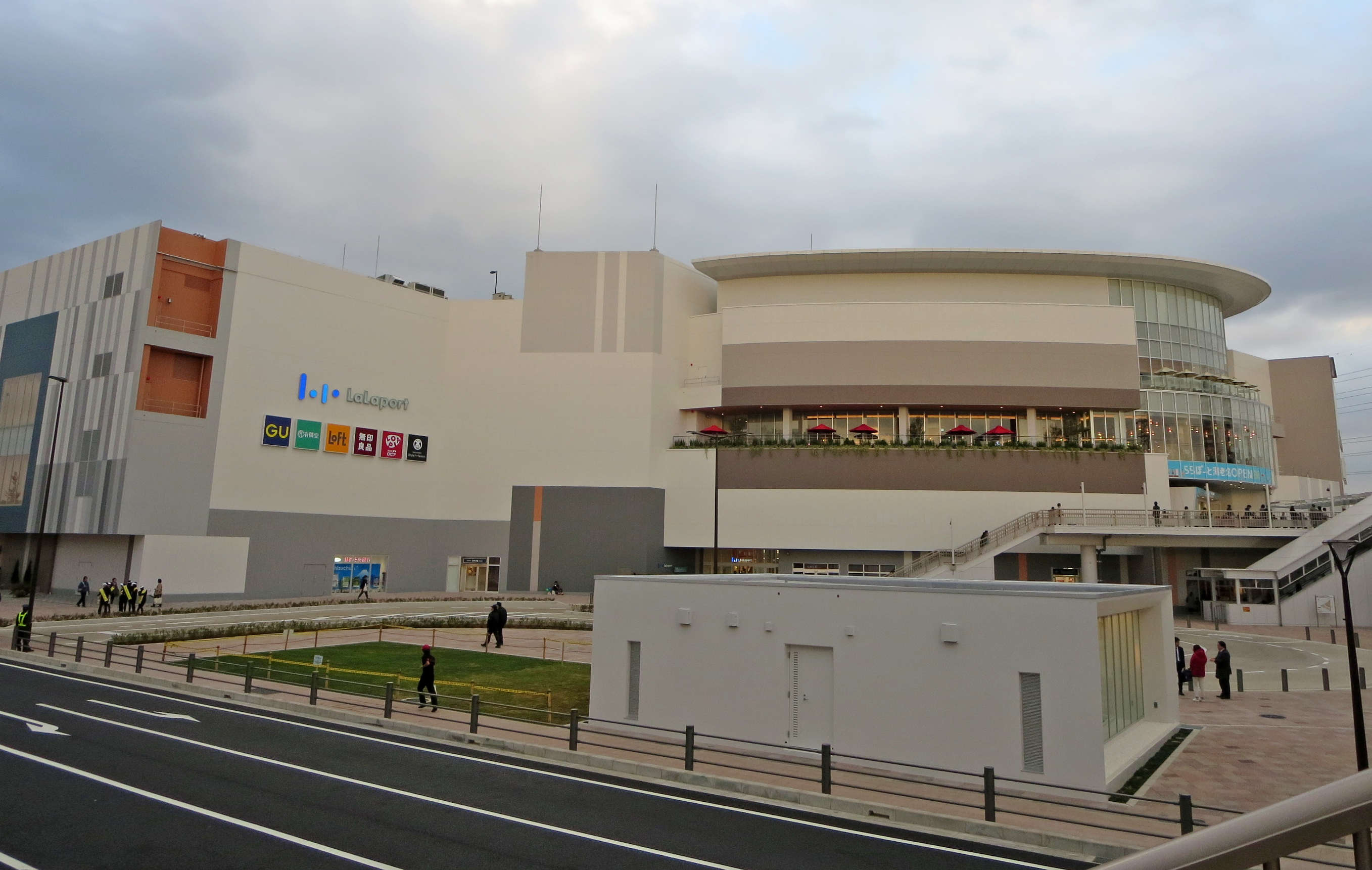 ららぽーと海老名